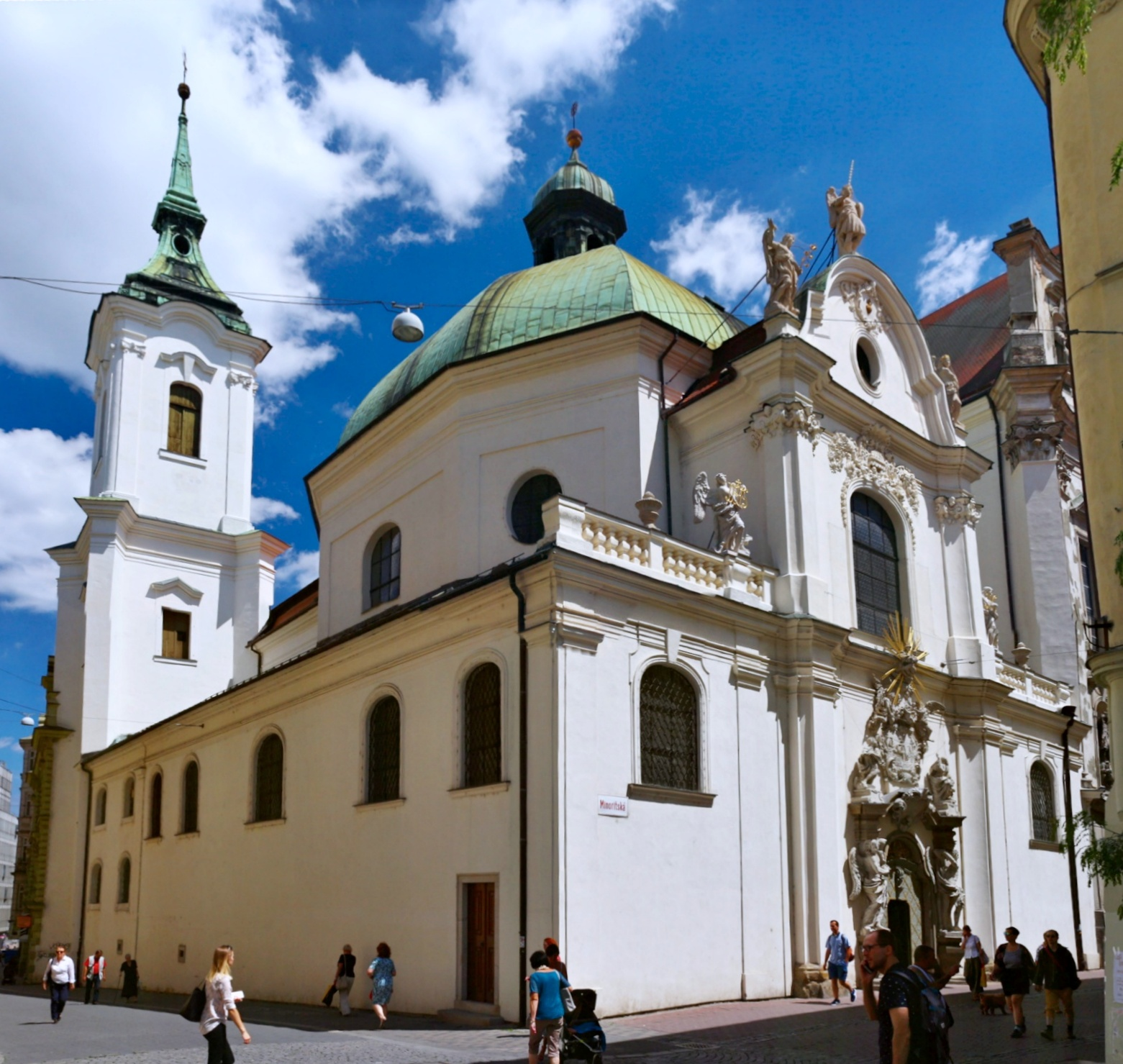 Loretánská kaple